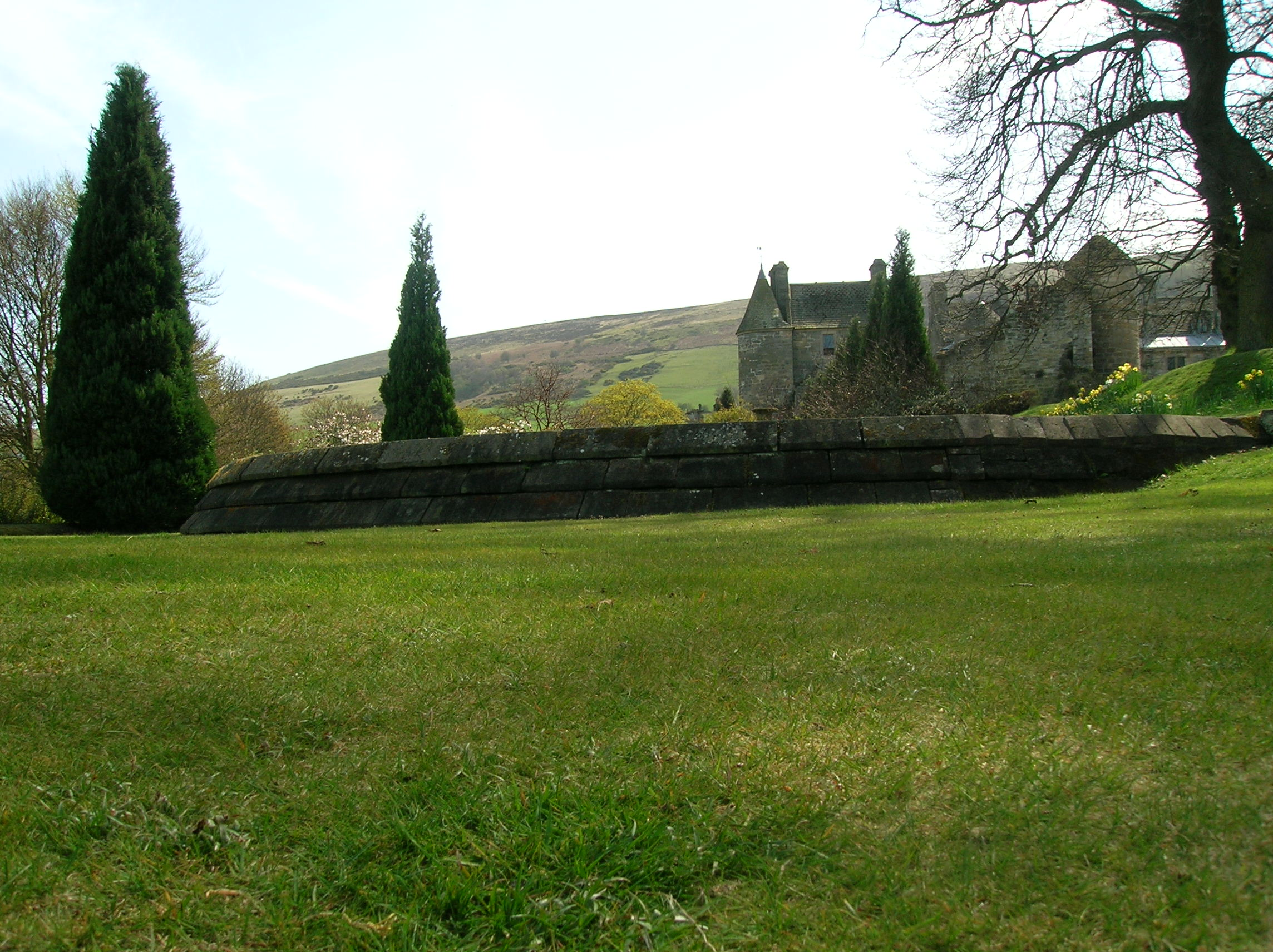 Falkland palace.